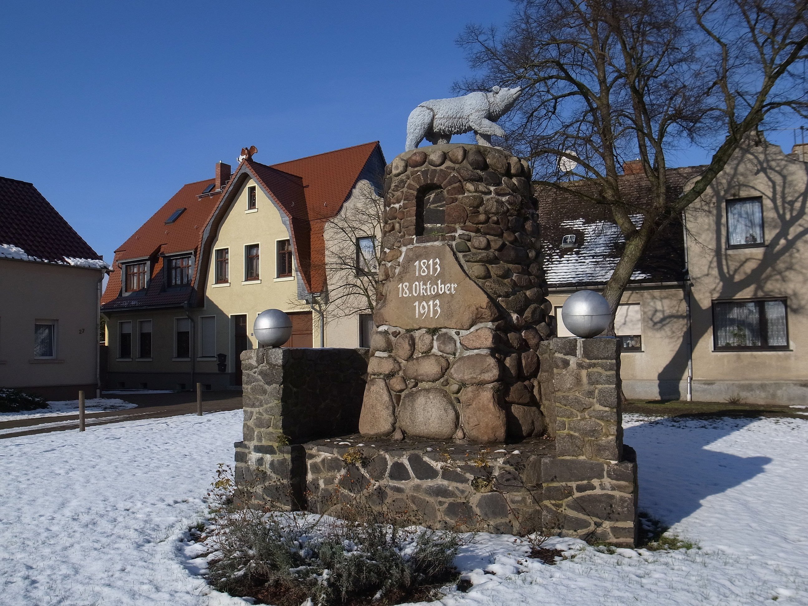 Stadt Zerbst/Anhalt, Denkmal im Ortsteil Lindau (Baudenkmal im Denkmalverzeichniss Sachsen-Anhalt, Erfassungsnummer: 094 41206 000 000 000 000 [1]) Das Denkmal erinnert an die Völkerschlacht von 1813 und den Sieg über Napoleon. Es wurde 1913 errichtet.